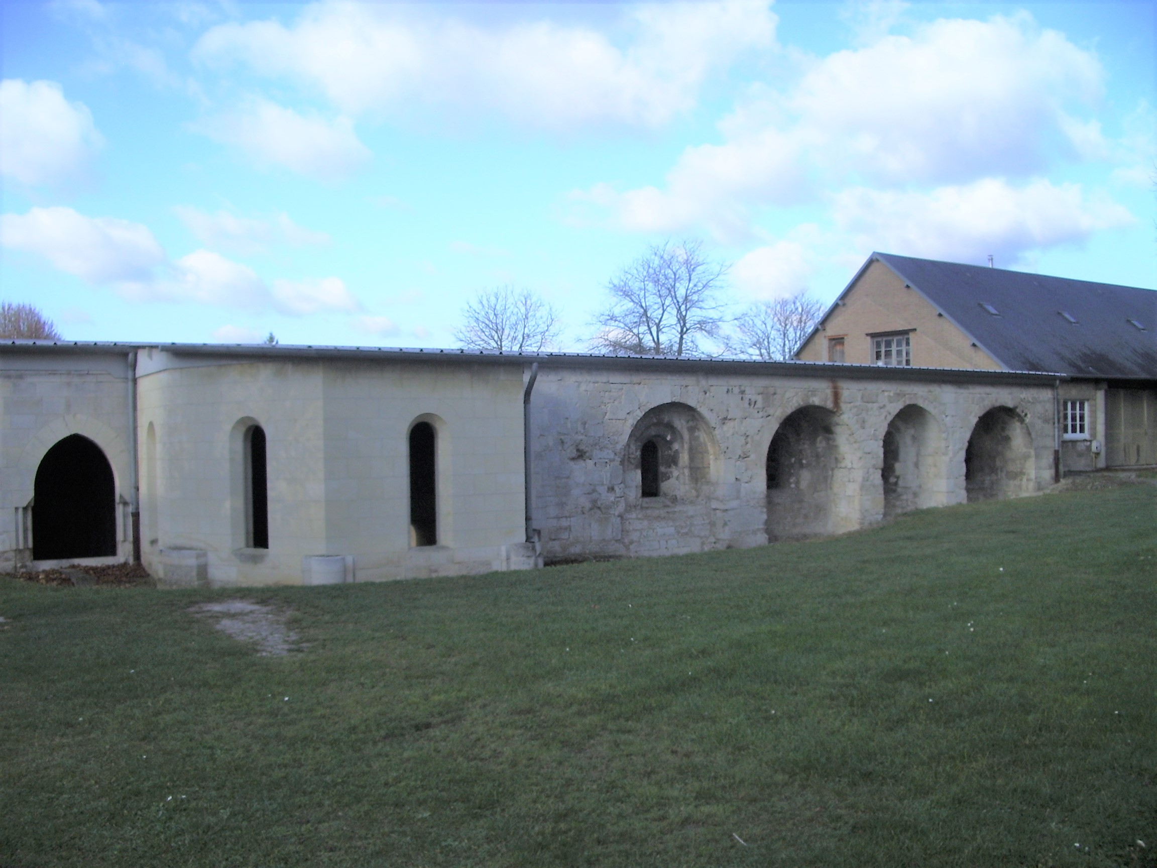 St. Medard Soissons, Kryptaruine